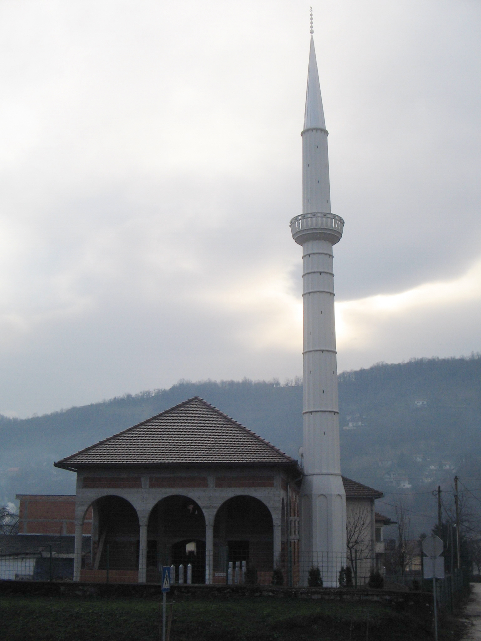 Mehdi-bega Imamovića džamija